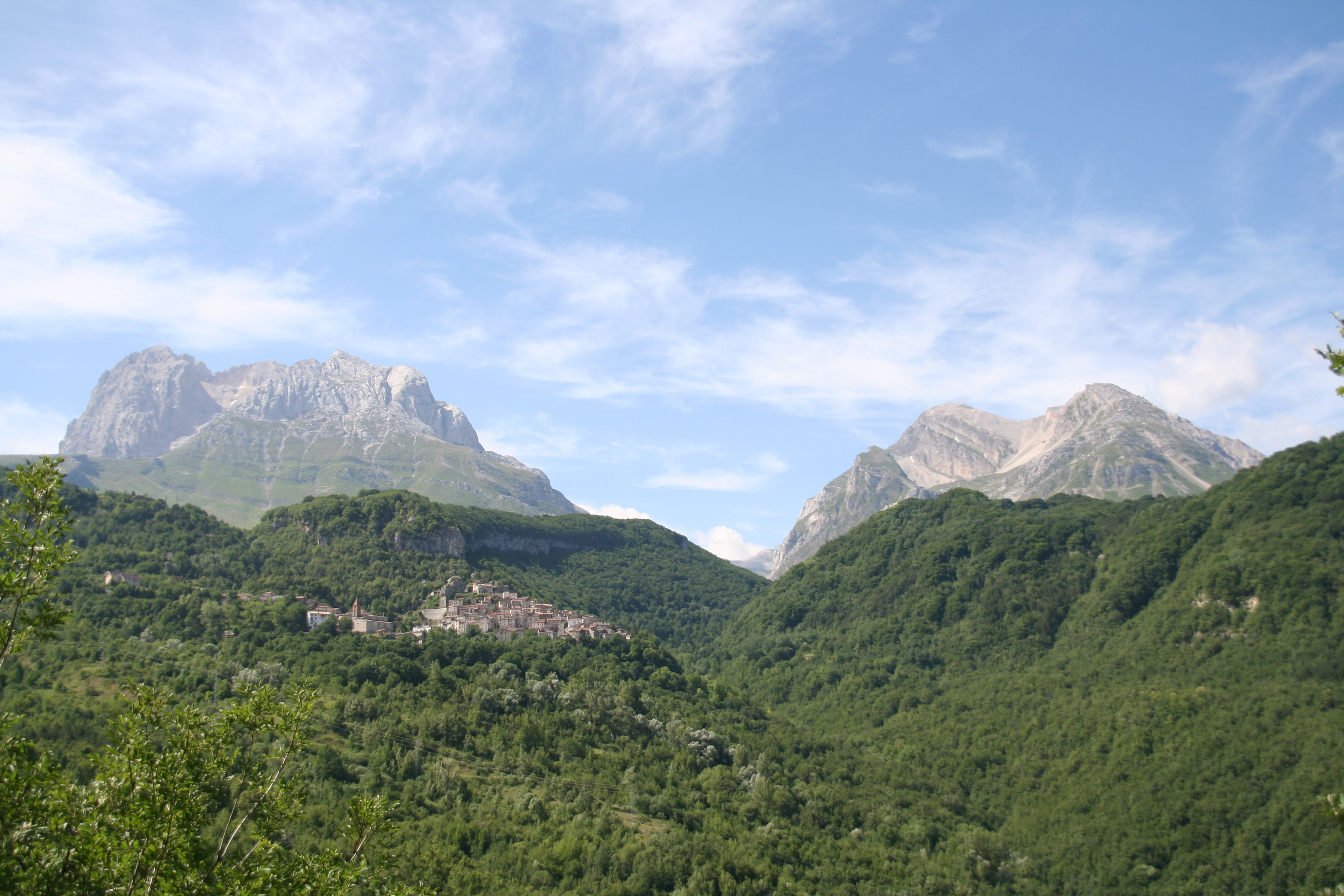 gran sasso e pizzo intermesoli (DC)